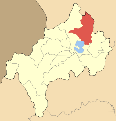 Дем Вич на картата на Ном Костур, Гърция Locator map of Vitsiou municipality (Δήμος Βιτσίου) at Kastoria perfecture, Greece).